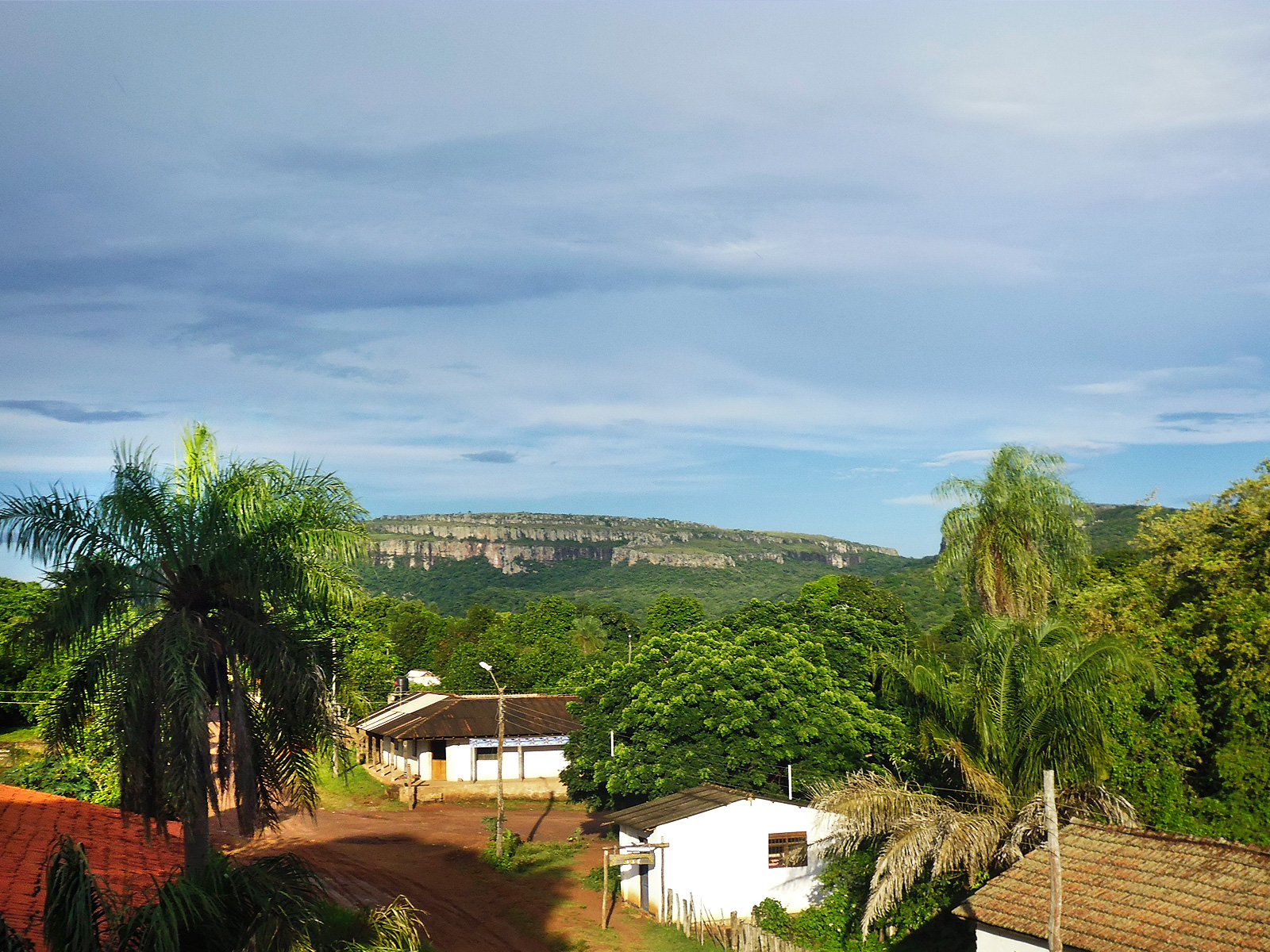 A la distancia la Serranía de Santiago de Chiquitos